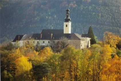 Foto von Johannes Hartl - aufgenommen vom "Rehgraben" am Silbersberg